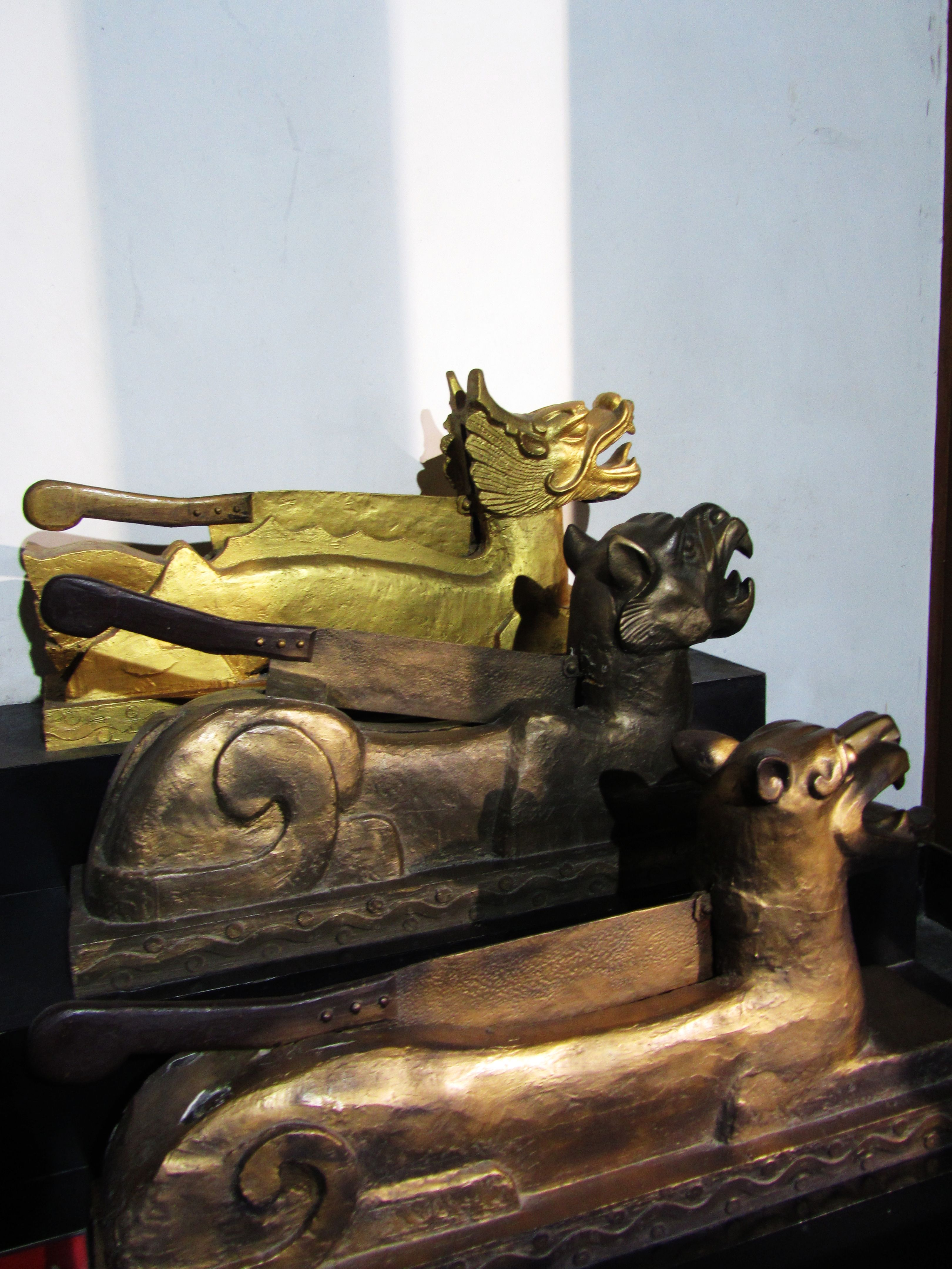 合肥包肃孝公祠内龙头铡、虎头铡和狗头铡。